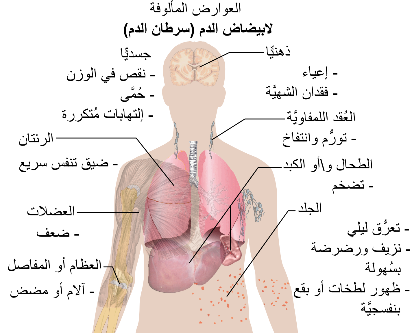 الأعراض المألوفة لابيضاض الدم أو سرطان الدم.